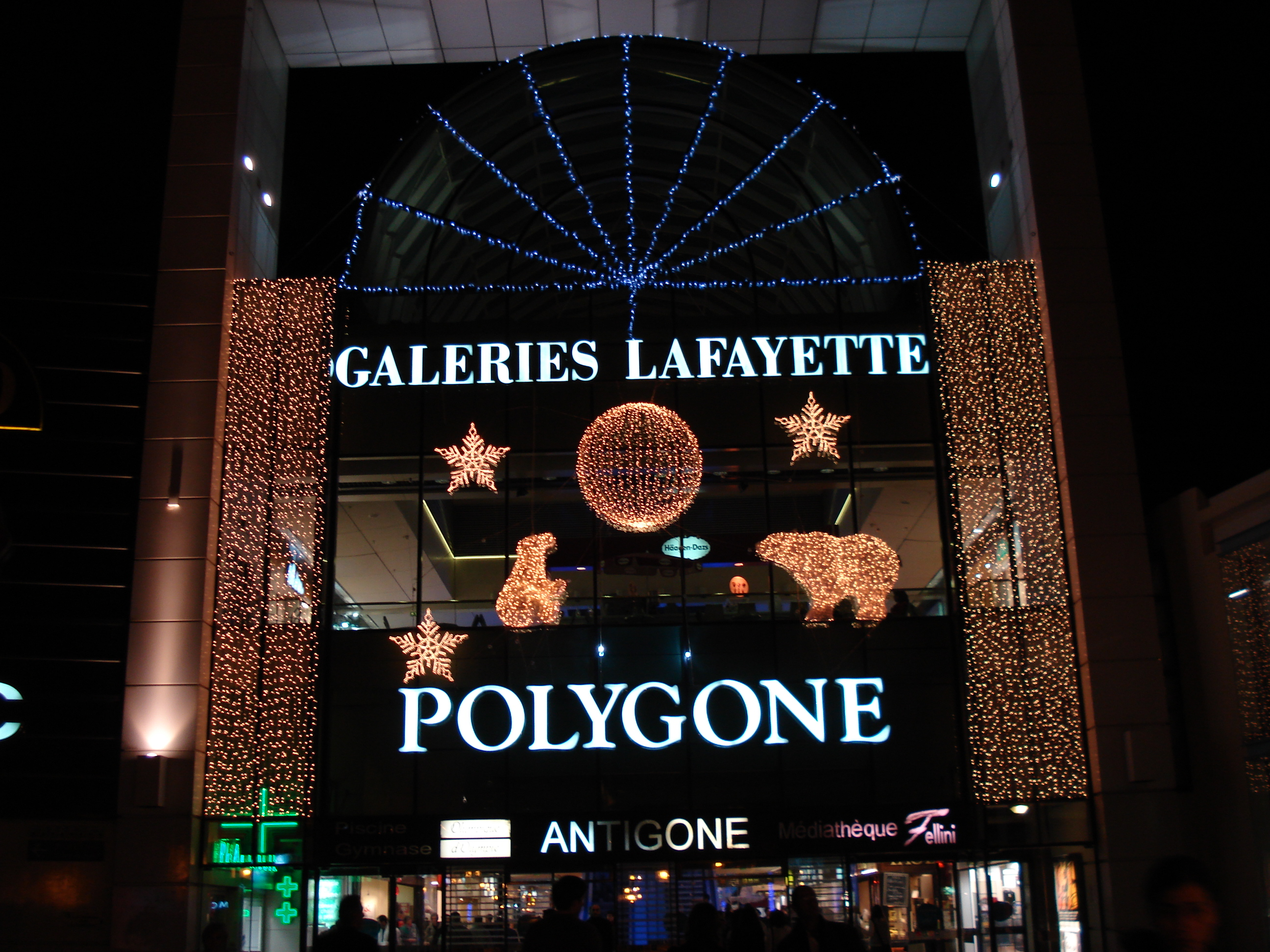 Kjøpesenteret "Polygone" i Montpellier.